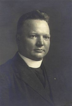 Robert Schälzky